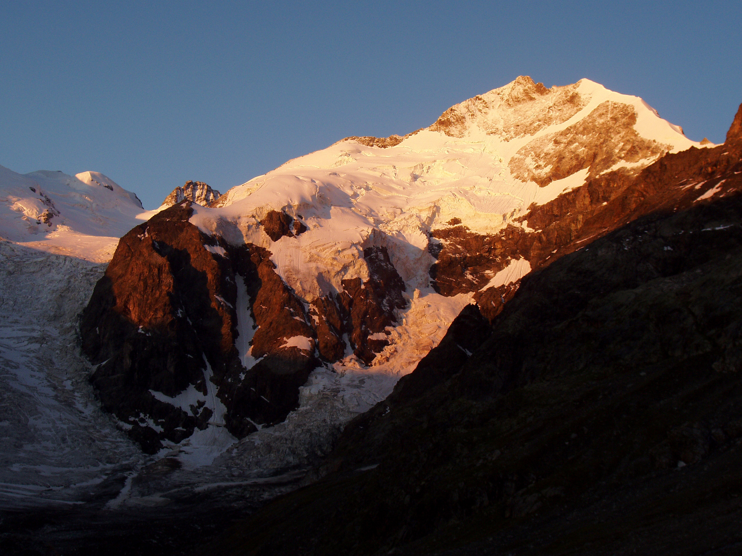 Sonnenaufgang am Piz Bernina. Von rechts zieht der berühmte Biancograt gegen den Vorgipfel des Piz Alv (Piz Bianco), der vom 4.049 m hohen Bernina-Hauptgipfel durch eine Scharte getrennt ist. Foto vom 30.06.2005, 5:33 Uhr, gesehen von der Chamanna dal Boval, 2.495 m. Sunrise at Piz Bernina, 30.06.2005.Photo was taken from Boval-hut, 2.495 m.